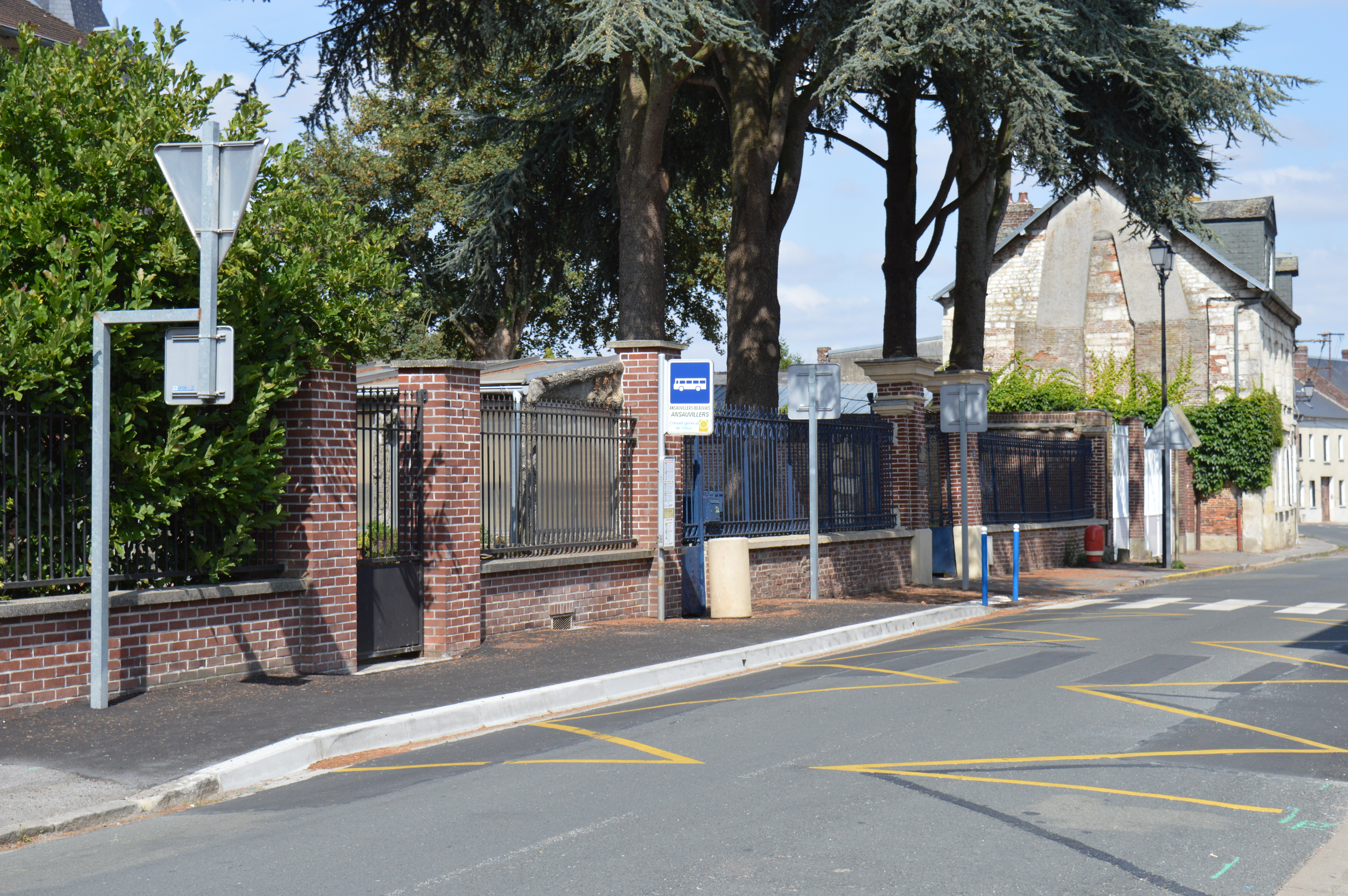 Nouveau quai accessible aux PMR à Ansauvilliers